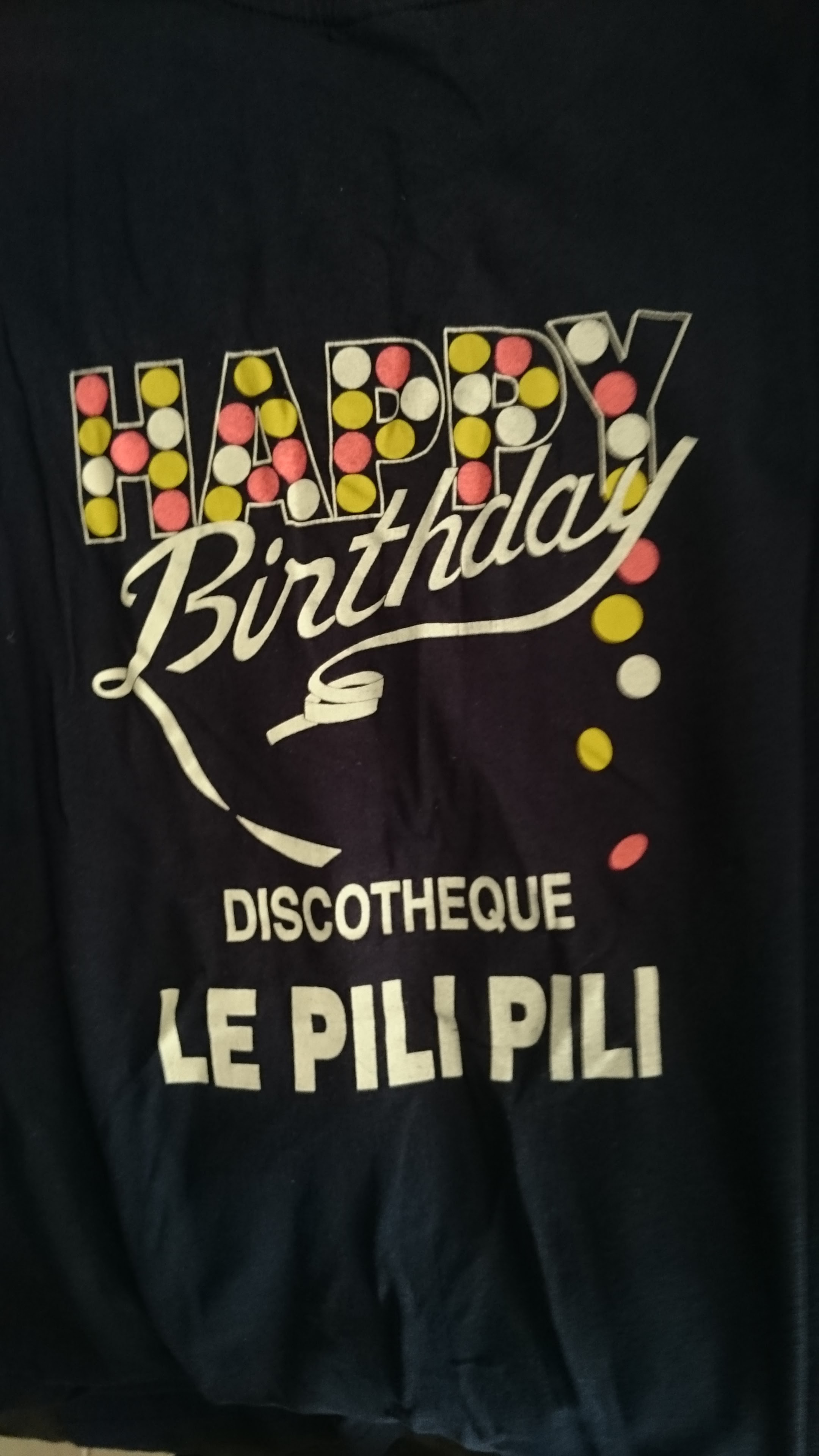 Discothèque le pili pili